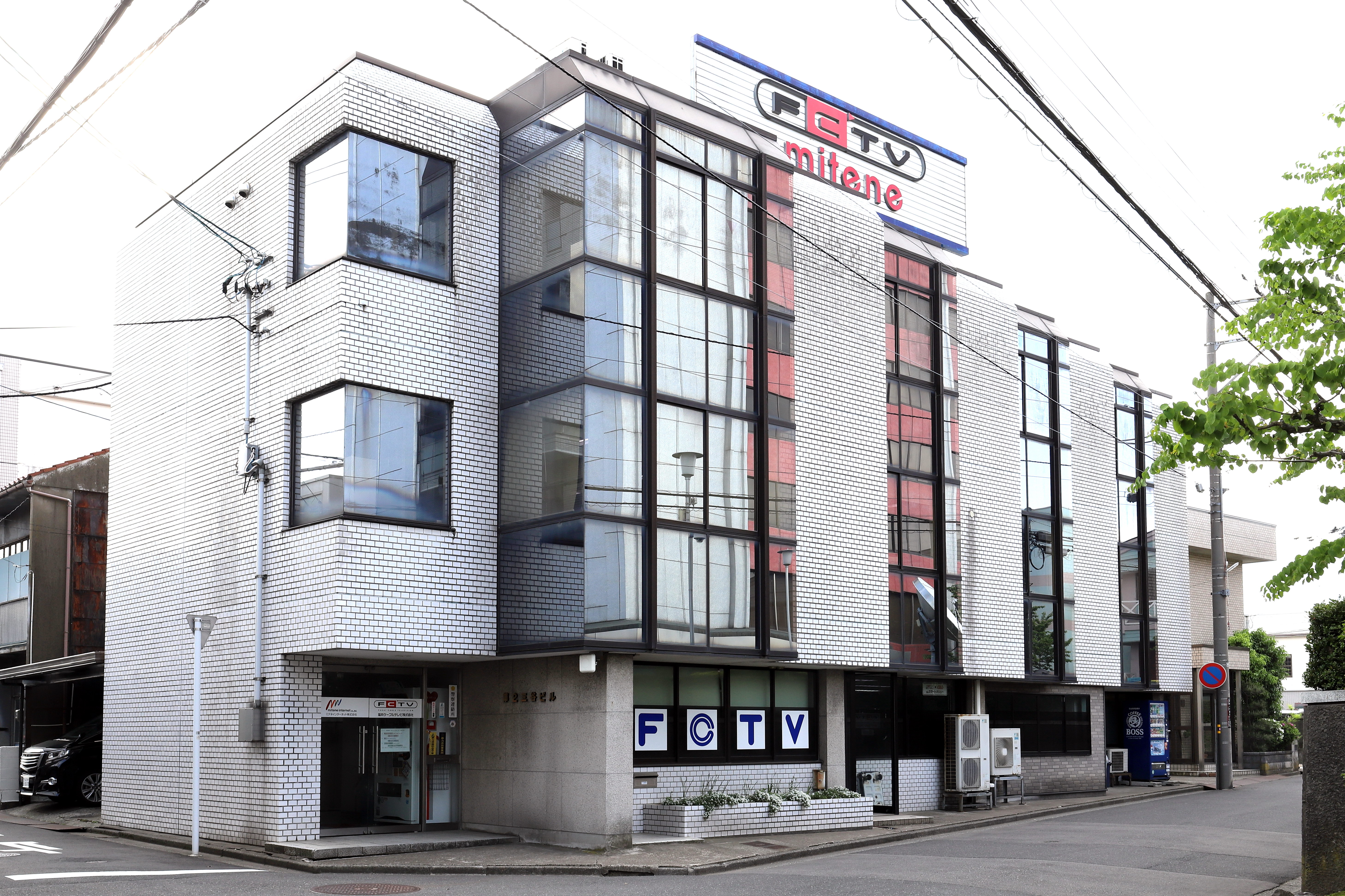 福井ケーブルテレビ